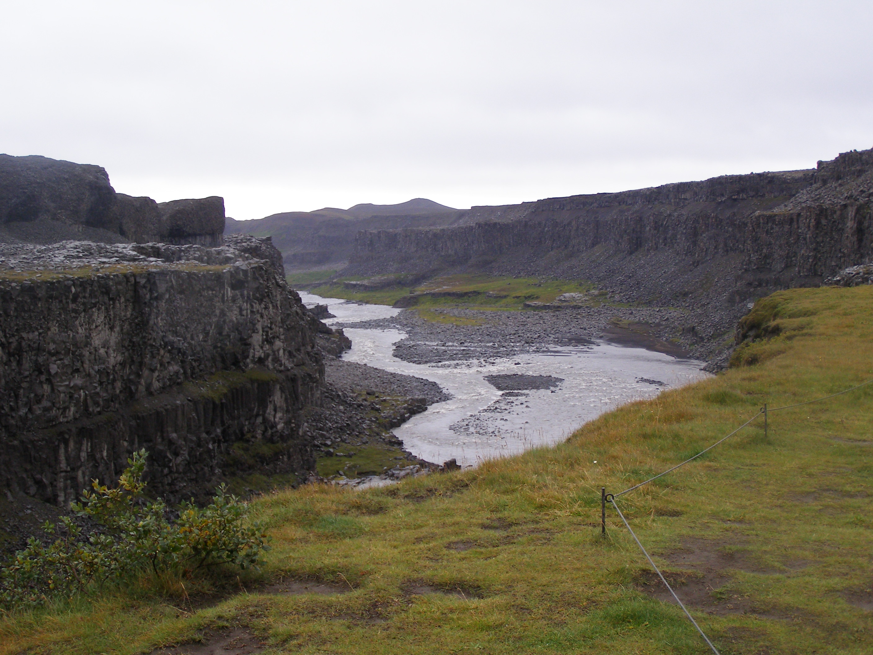 Jökulsá á Fjöllum after Dettifoss, Jökulsárgljúfur